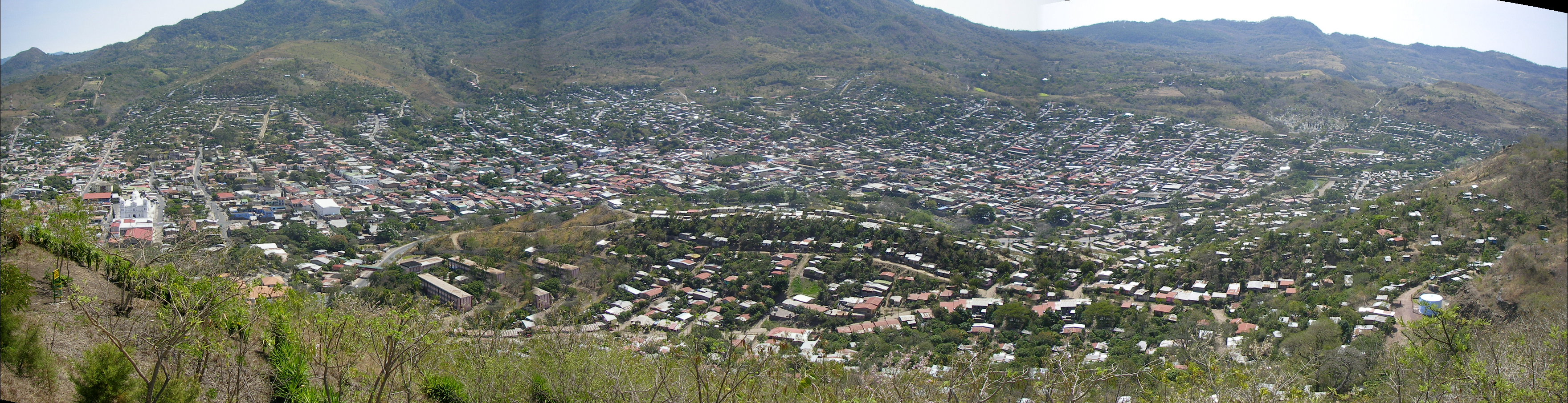 Panoramica del casco principal de Matagalpa, tomada del Mirador del Cerro del Calvario o Cerro de La Virgen, costado Oeste del Rio Grande de Matagalpa.